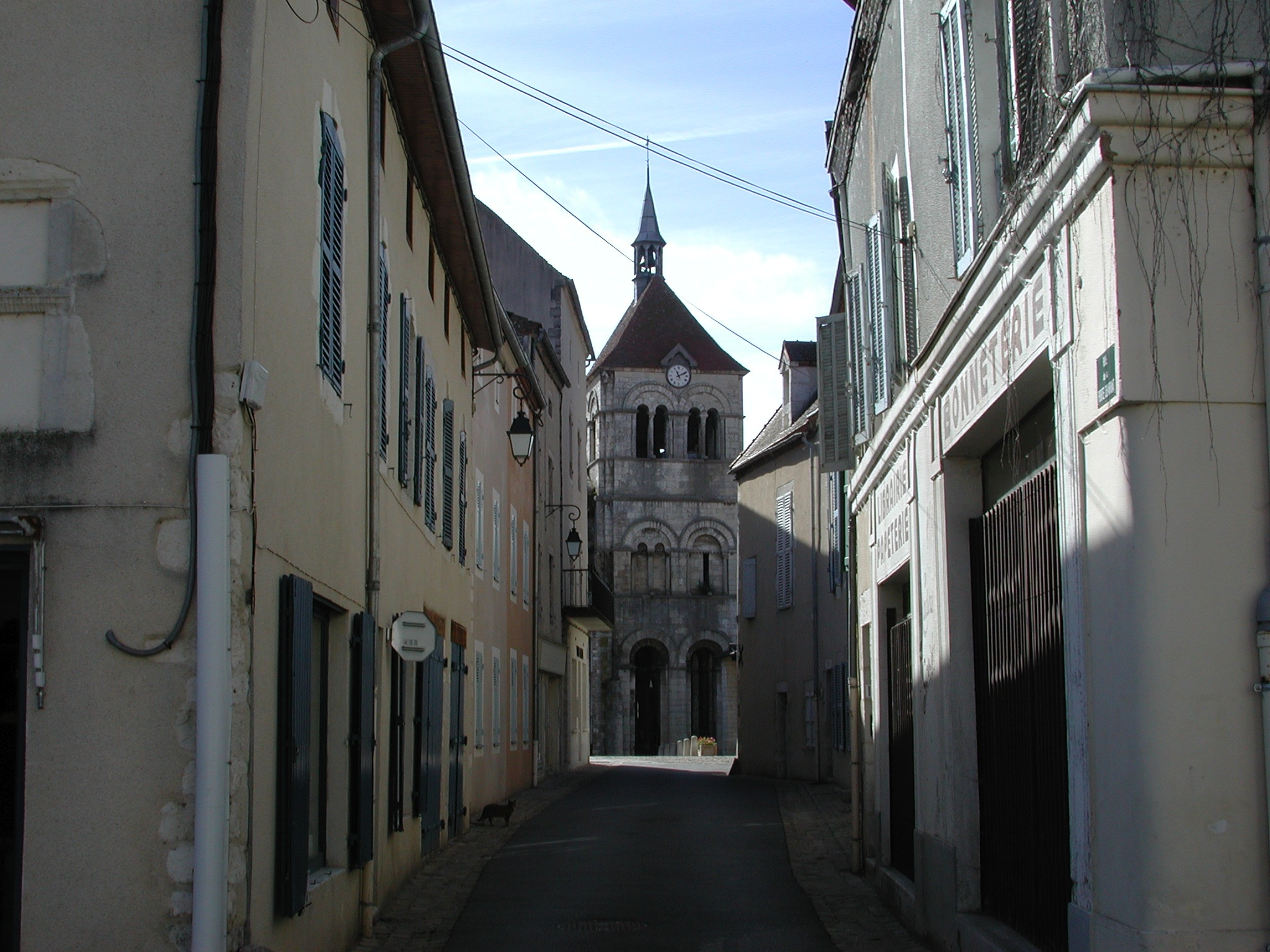 Clocher de l'abbatiale Saint-Léger d'Ébreuil (Allier) vu de la rue de la Porte-Charrat (côté nord).